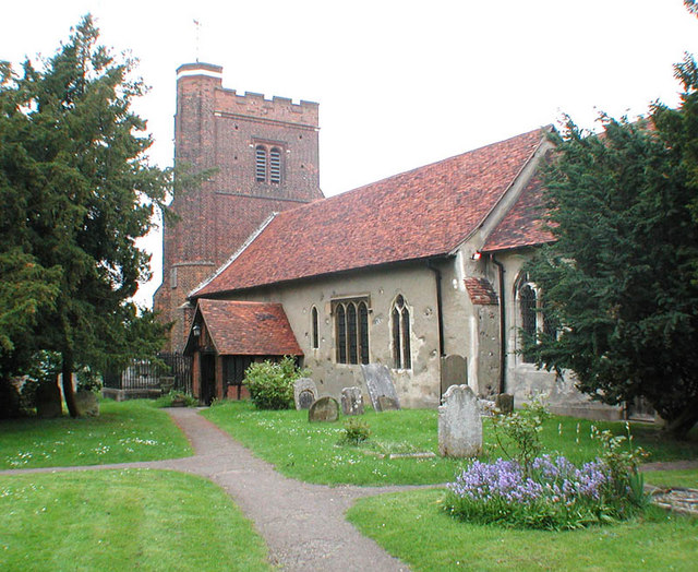 All Saints, Nazeing, Essex